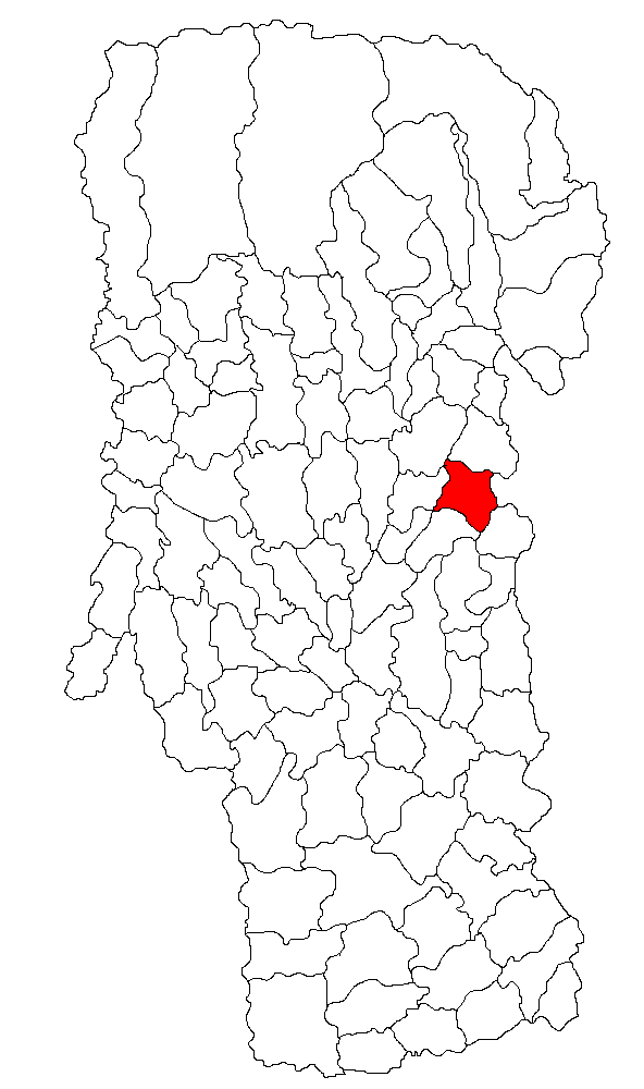 Categorie:Hărţi ale judeţului Argeş